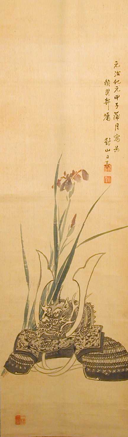 冑に菖蒲の図 日根対山筆（竹原・春風館蔵）